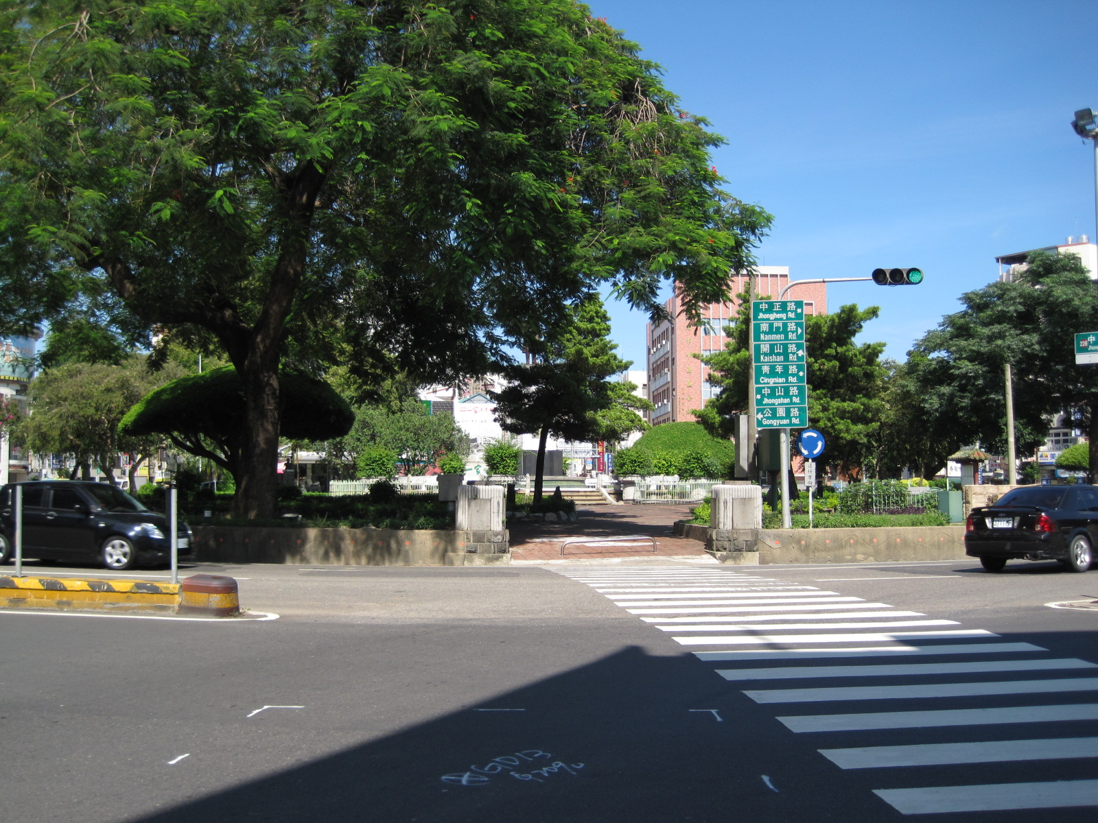 中文（台灣）: 湯德章紀念公園入口。